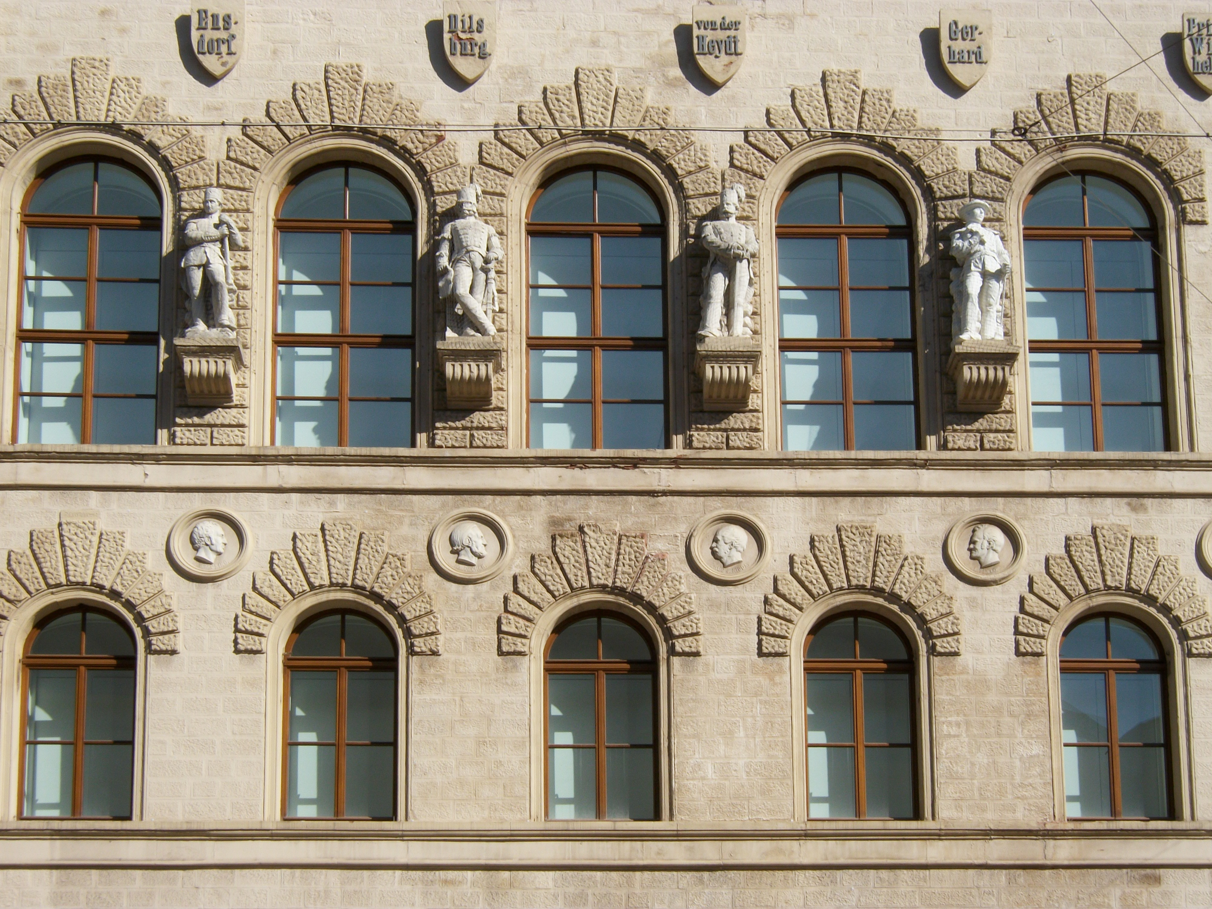 Bergwerksdirekrion Saarbrücken, heute "Europagalerie"